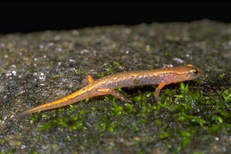 Desmognathus aeneus